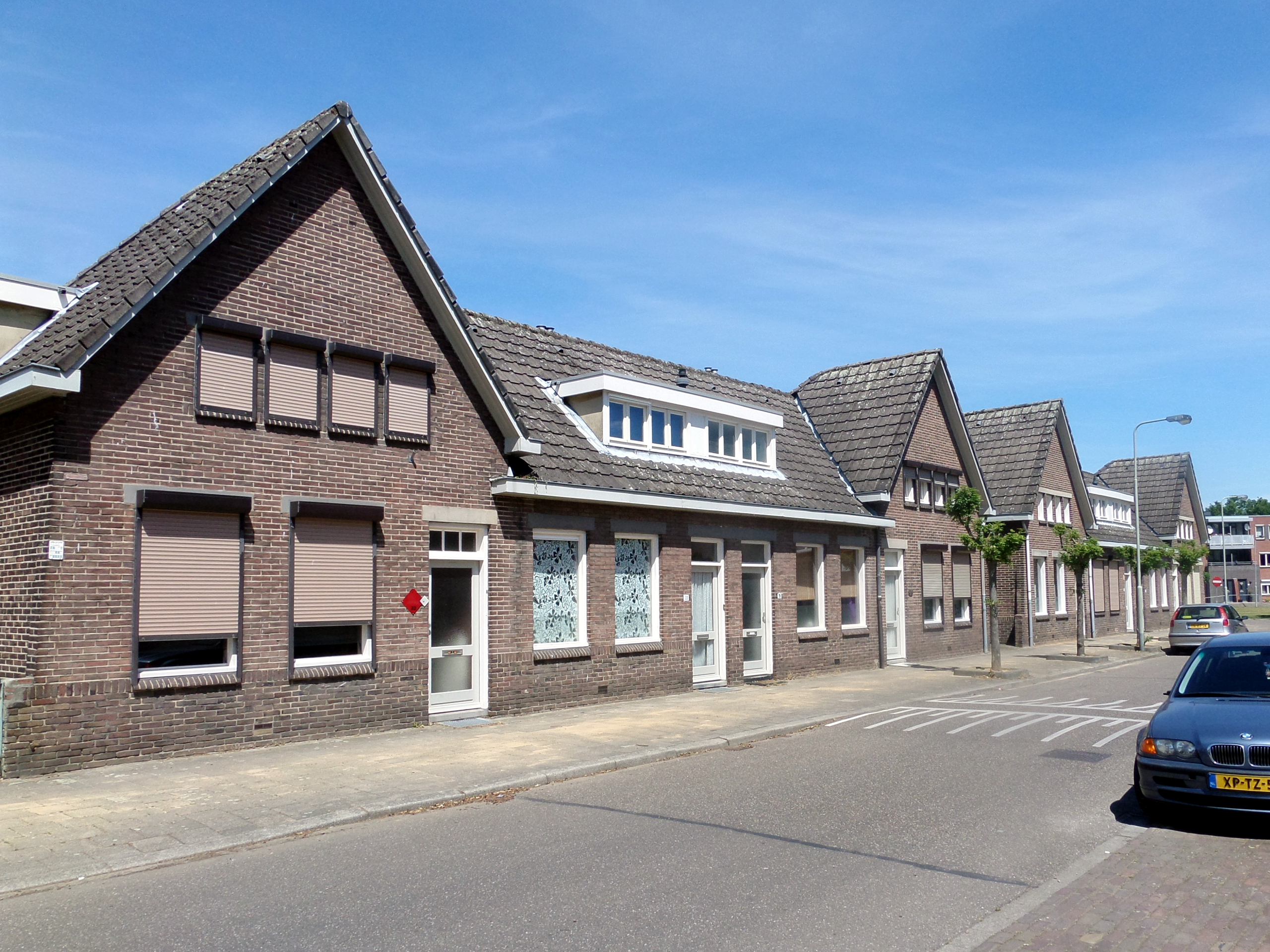 Vooroorlogse mijnwerkerswoningen aan de Ericastraat in de Sittardse wijk Sanderbout